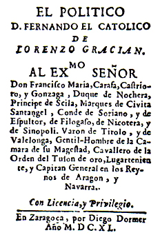 Descripción sintética Baltasar Gracián, El Político don Fernando el Católico, Zaragoza, Diego Dormer, 1640. Descripción analítica: EL POLITICO/ D. FERNANDO EL CATOLICO/ DE / LORENZO GRACIAN./ AL EXMO SEÑOR/ Don Francisco Maria,Carafa,Castrio-/to, y Gonzaga , Duque de Nochera,/ Principe de Scila, Marques de Civita/ Santangel , Conde de Soriano , y de/ Espultor, de Filogaso, de Nicotera, y/ de Sinopoli. Varon de Tirolo , y de/ Valelonga, Gentil-Hombre de la Ca-/mara de su Magestad, Cavallero de la/ Orden del Tuson de oro,Lugartenien/te, y Capitan General en los Rey-/ nos de Aragon , y/ Navarra./ Con Licencia,y Privilegio./ En Zaragoça , por Diego Dormer/ Año M. D C. X L.